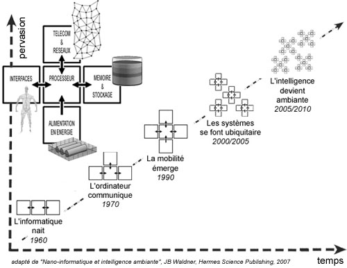 Évolution de l'ordinateur entre les années 1960 et 2010. Cette évolution s’articule autour de cinq blocs fonctionnels : le processeur, la mémoire et les dispositifs de stockage de masse, les réseaux et télécommunications, les dispositifs d’alimentation en énergie (notions de mobilité ou plus encore d’informatique diffuse obligent) et les interfaces entre la machine et l’utilisateur ou la machine et le milieu.